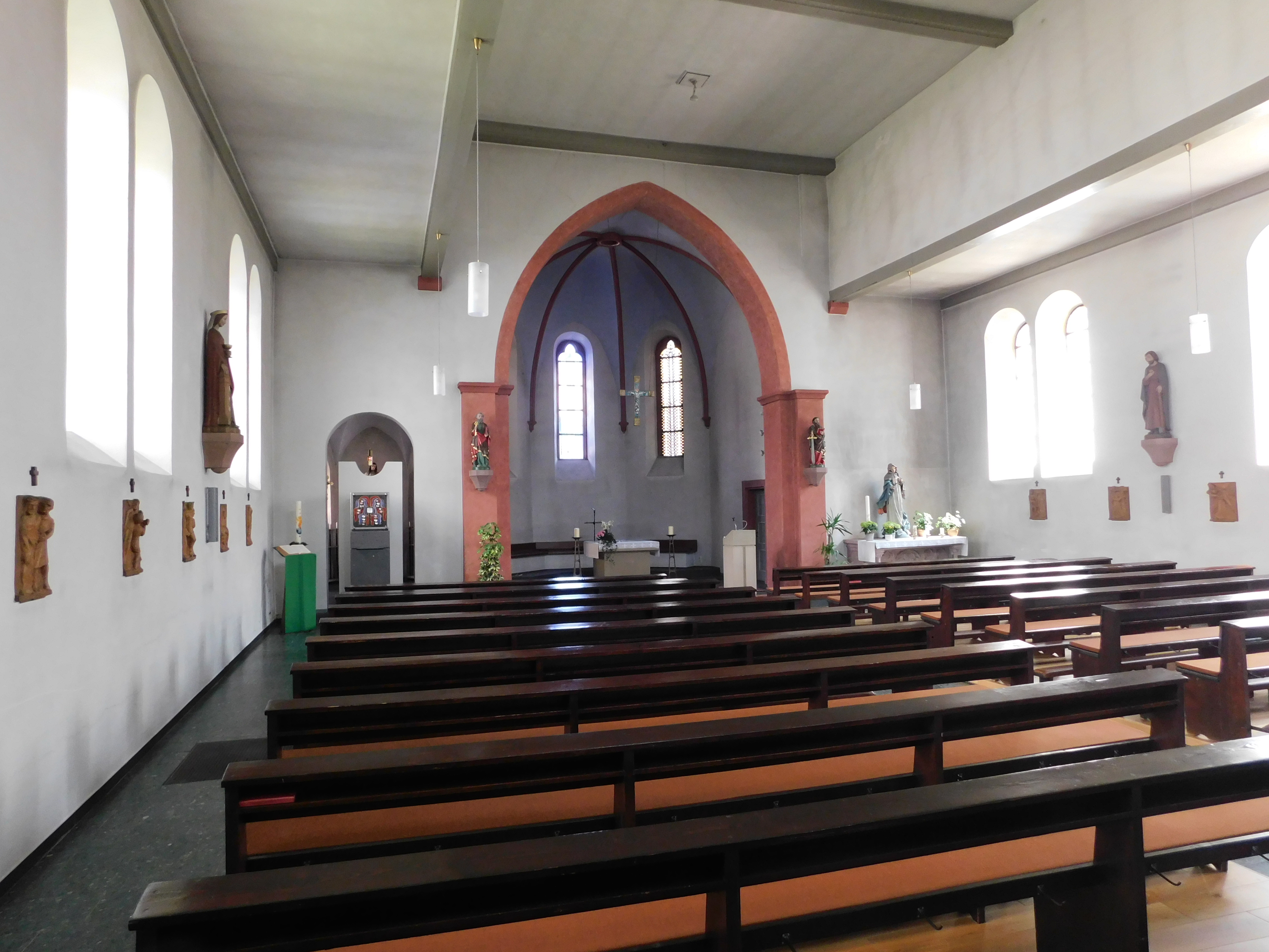 Sankt Barbara Kirche in Hellenthal-RescheidThis is a photograph of an architectural monument., no. 0